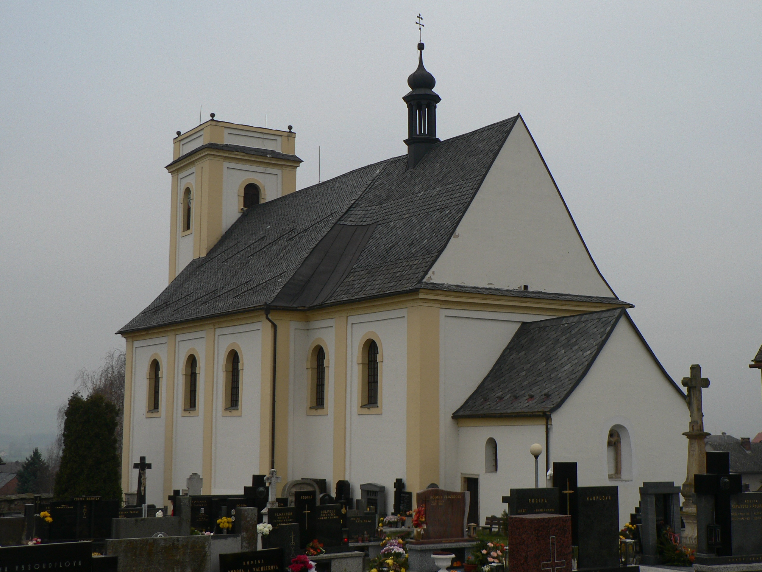 Kostel Povýšení svatého Kříže (Dubicko)